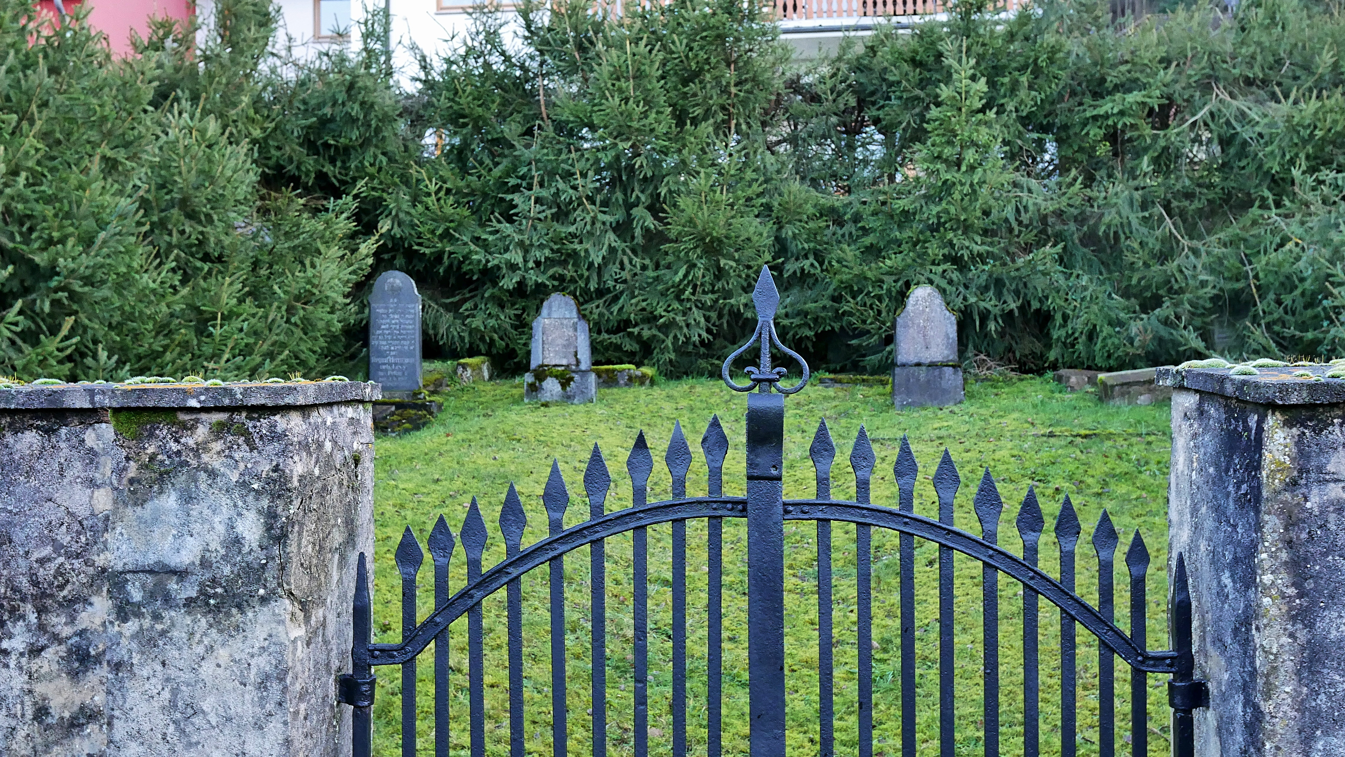 Jüdischer Friedhof Konz-Oberemmel Eingangtor und Grabsteine